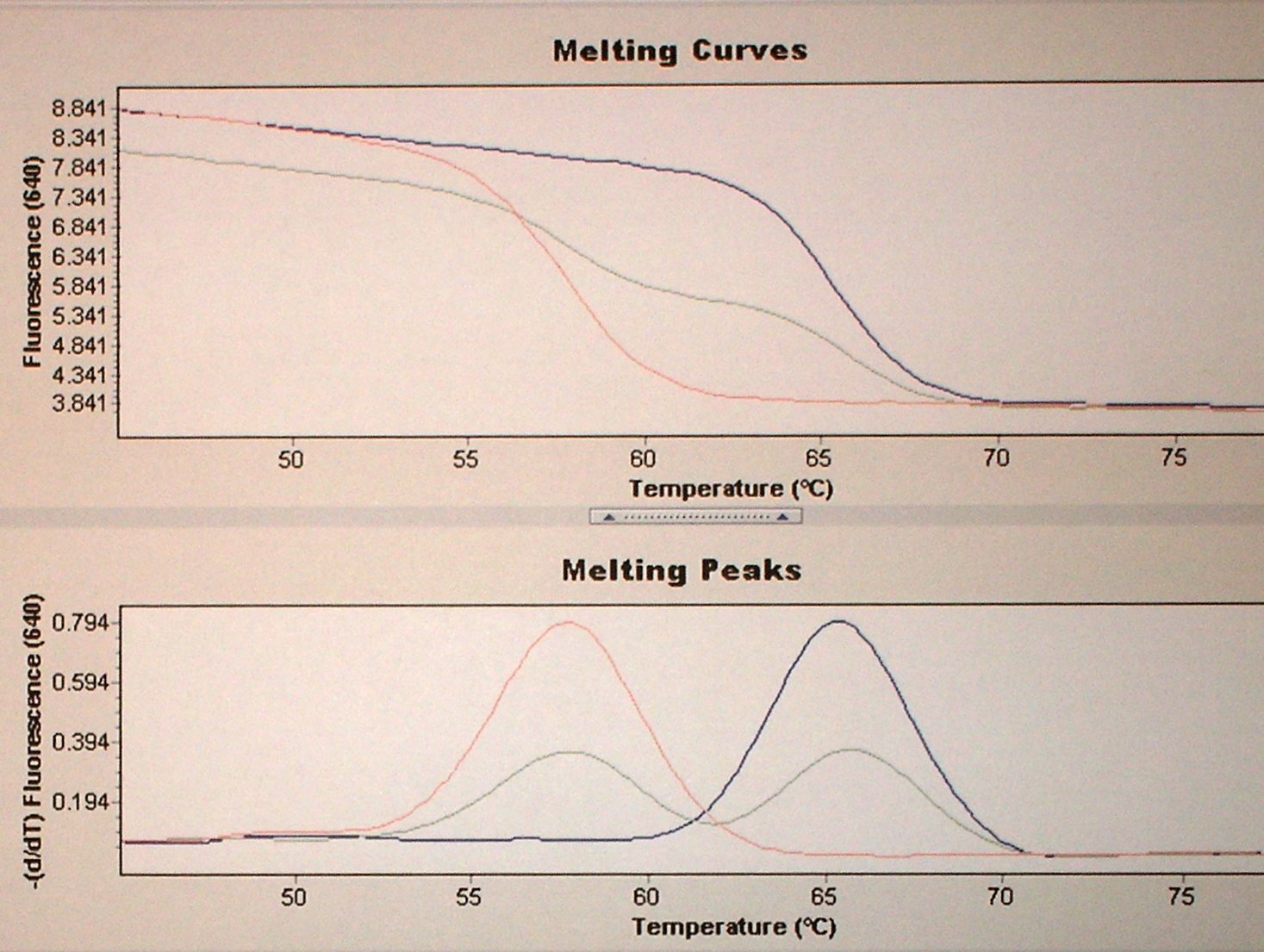 Courbes de fusion permettant le dépistatage de la mutation du facteur V de Leiden